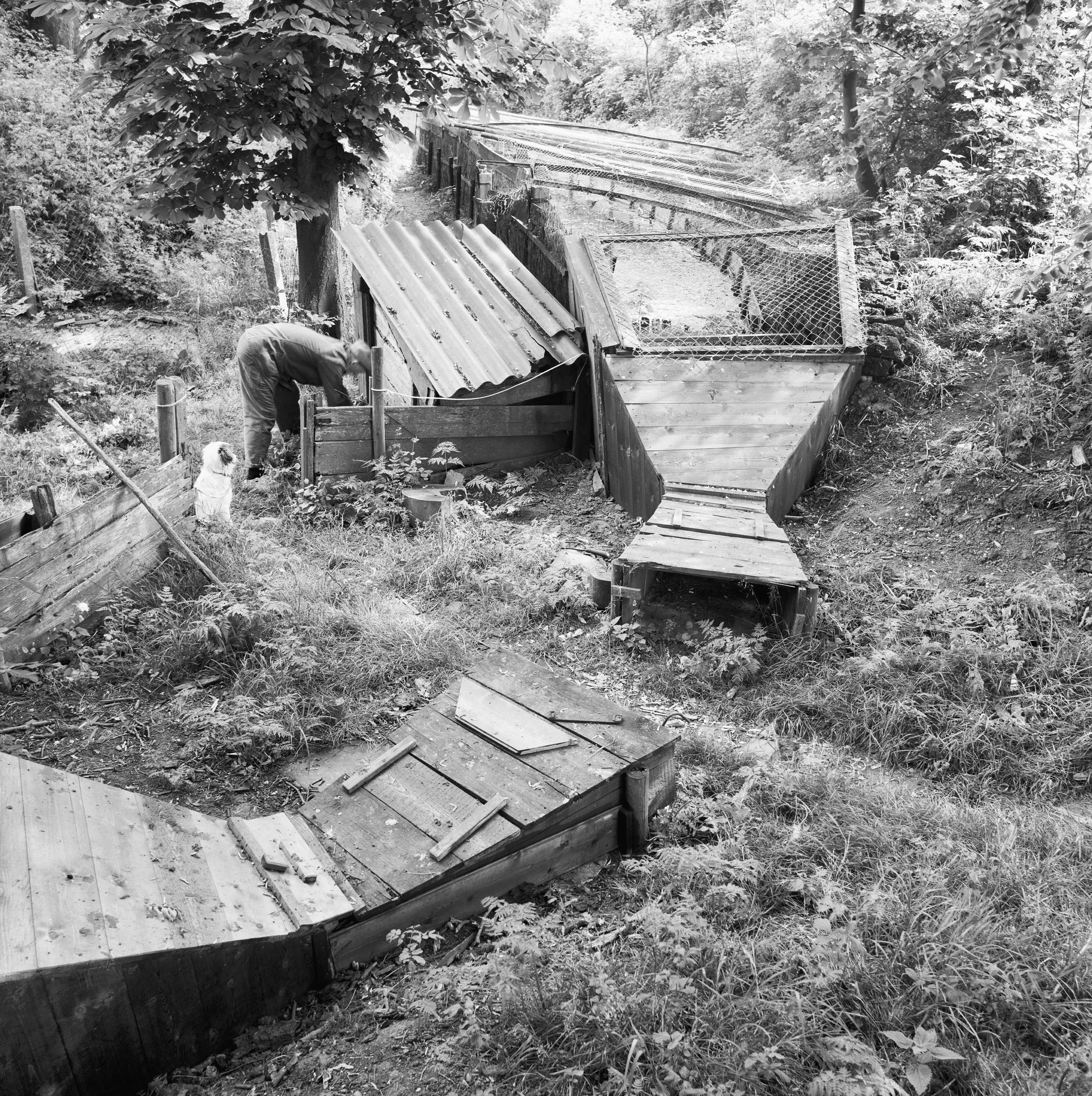 eendenkooi, overzicht